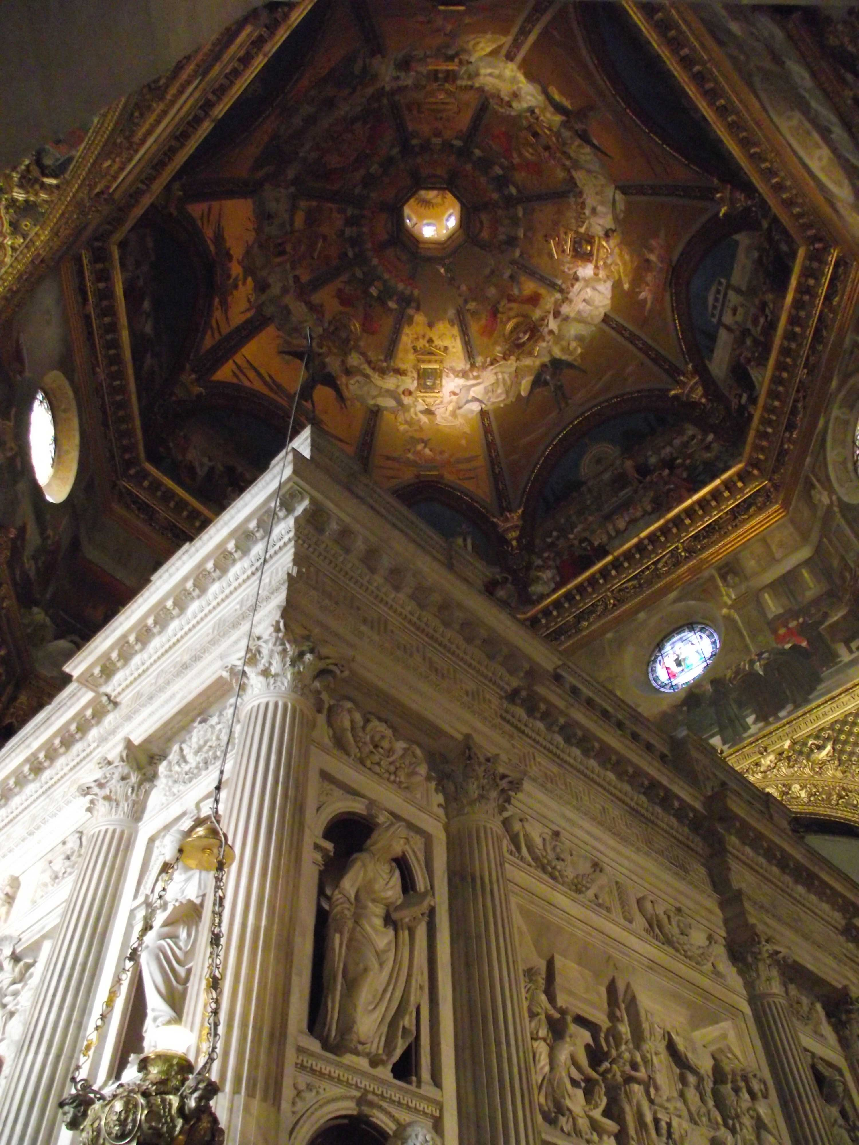 Loreto, Basilica della Santa Casa